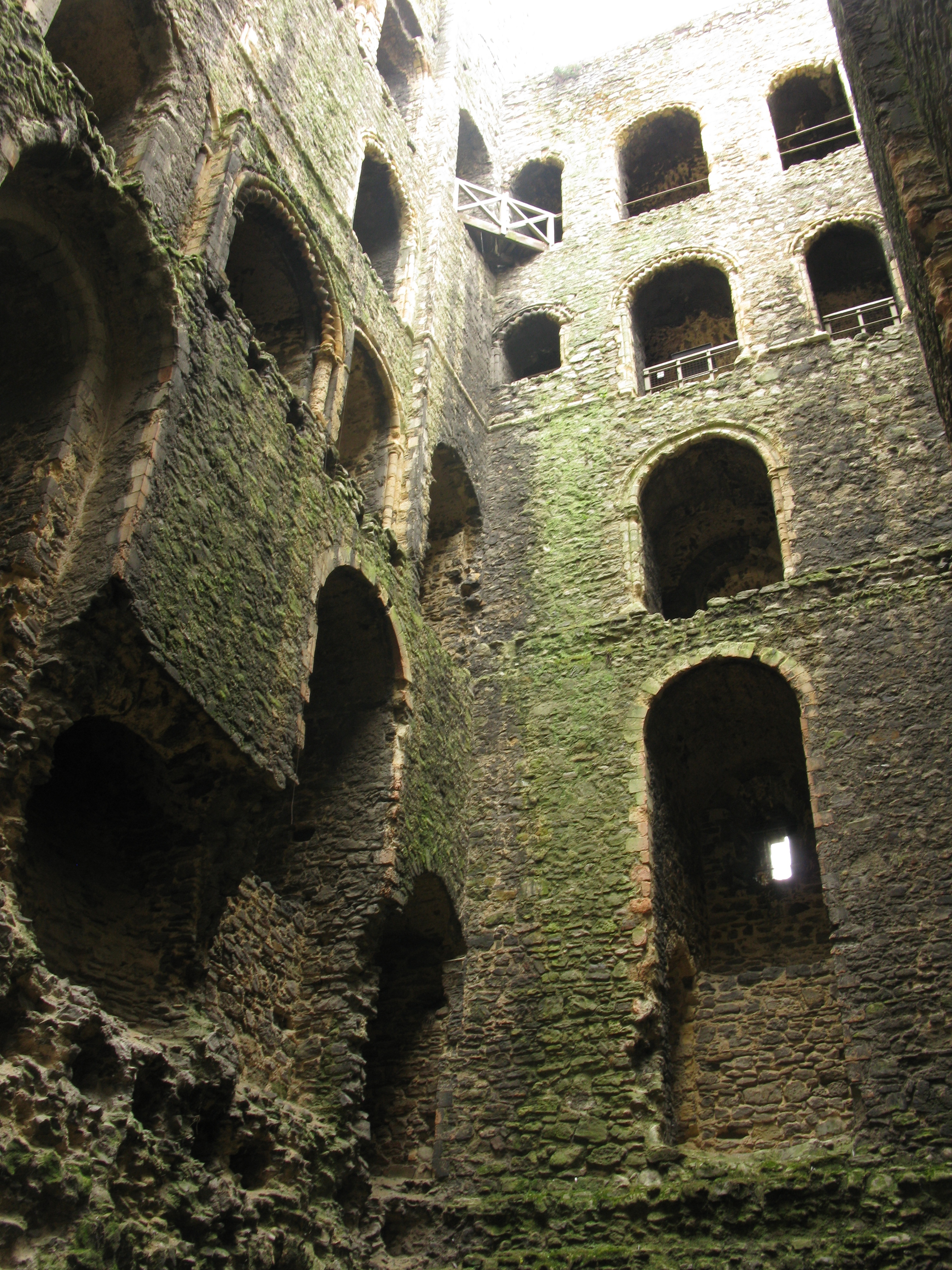 Внутри донжона Рочестерского замка